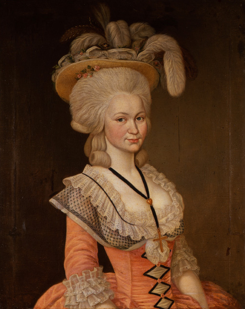 Portrait de Frédérique Stein de Nordheim, épouse de Godefroy comte Waldner de Freundstein ; mariée en 1783